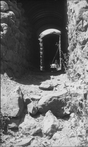 תל פאחר, התפצלות התעלה לכיוון הפיל בוקס הצפוני, ממנו השליכו רימון לעבר דני ביזר, וממנו הוא נפצע